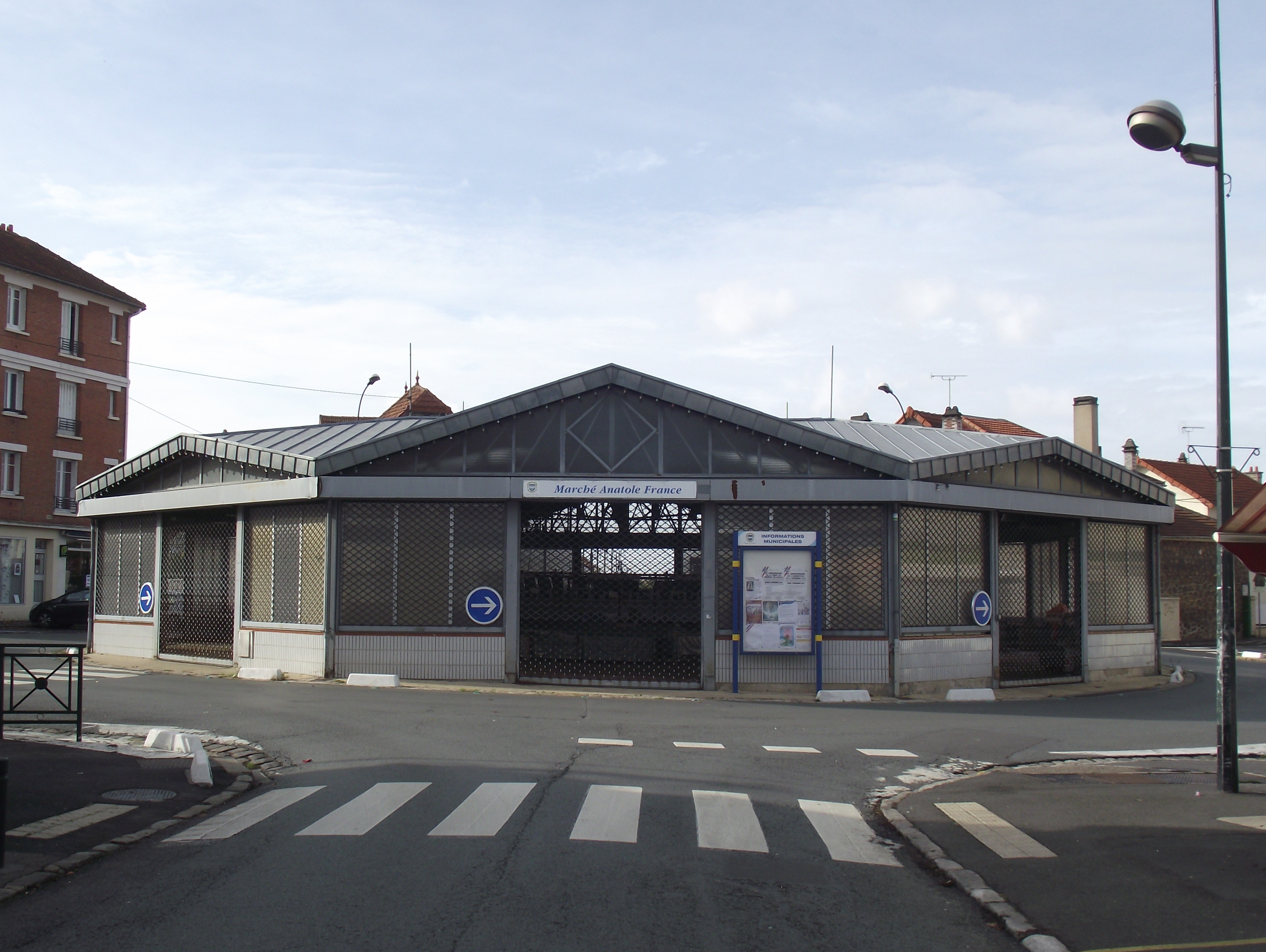 Marché Anatole France à Vigneux-sur-Seine (Essonne, Île-de-France, France).